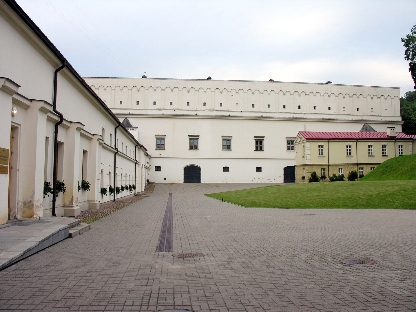 Senasis arsenalas, šiuo metu įsikūręs Taikomosios dailės muziejus. Old Arsenal in Vilnius Castle Complex, currently Museum of Applied Art.